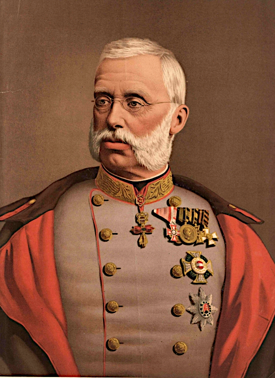 Albrecht, Erzherzog von Österreich (1817 - 1895) Erzherzog, Habsburg, Habsburg-Lothringen, Porträt